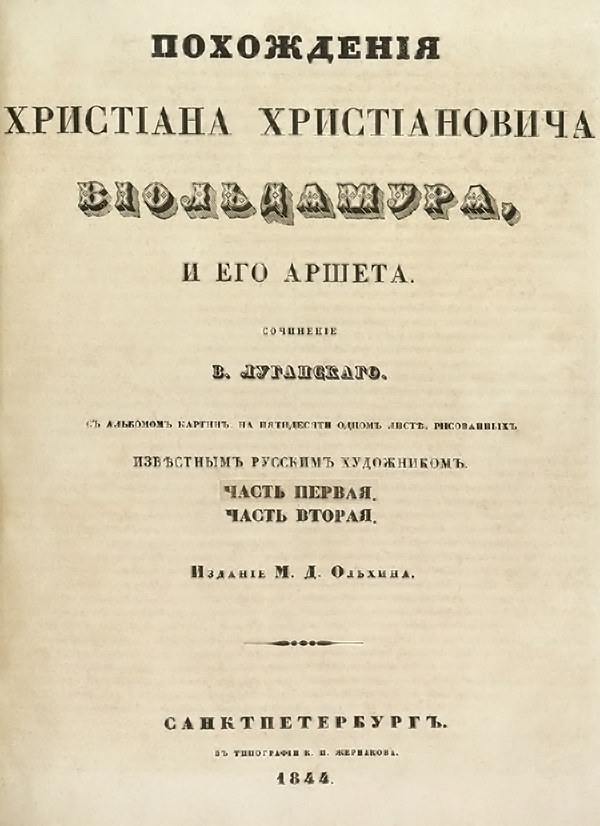 Титульный лист книги Владимира Даля «Похождения Христиана Христиановича Виольдамура и его Аршета» с иллюстрациями А.П. Сапожникова, 1844